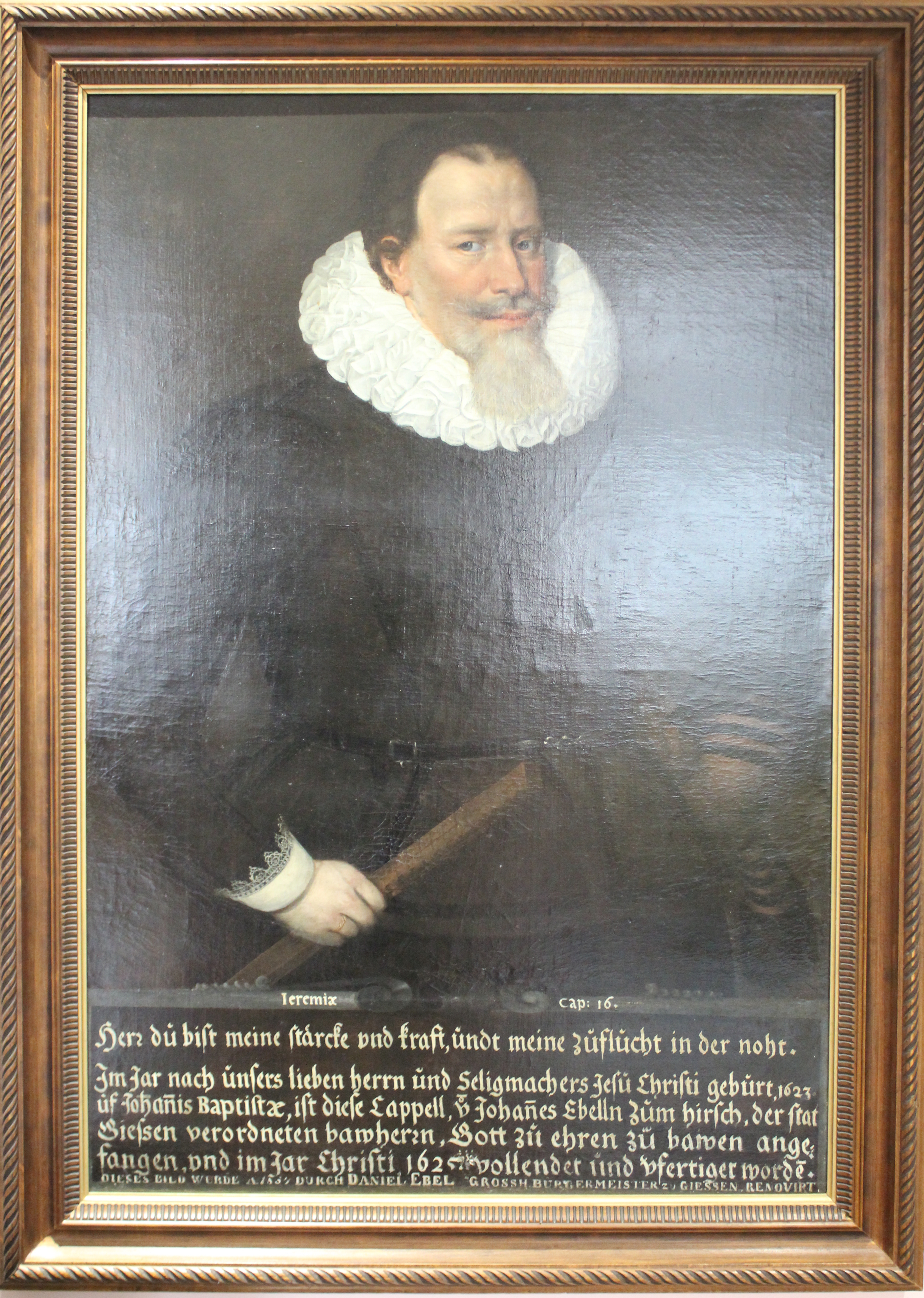 Gemälde Johannes Ebel zum Hirsch (um 1560–1636) von Clemens Beutler, Altes Schloss, Gießen, Hessen, Deutschland